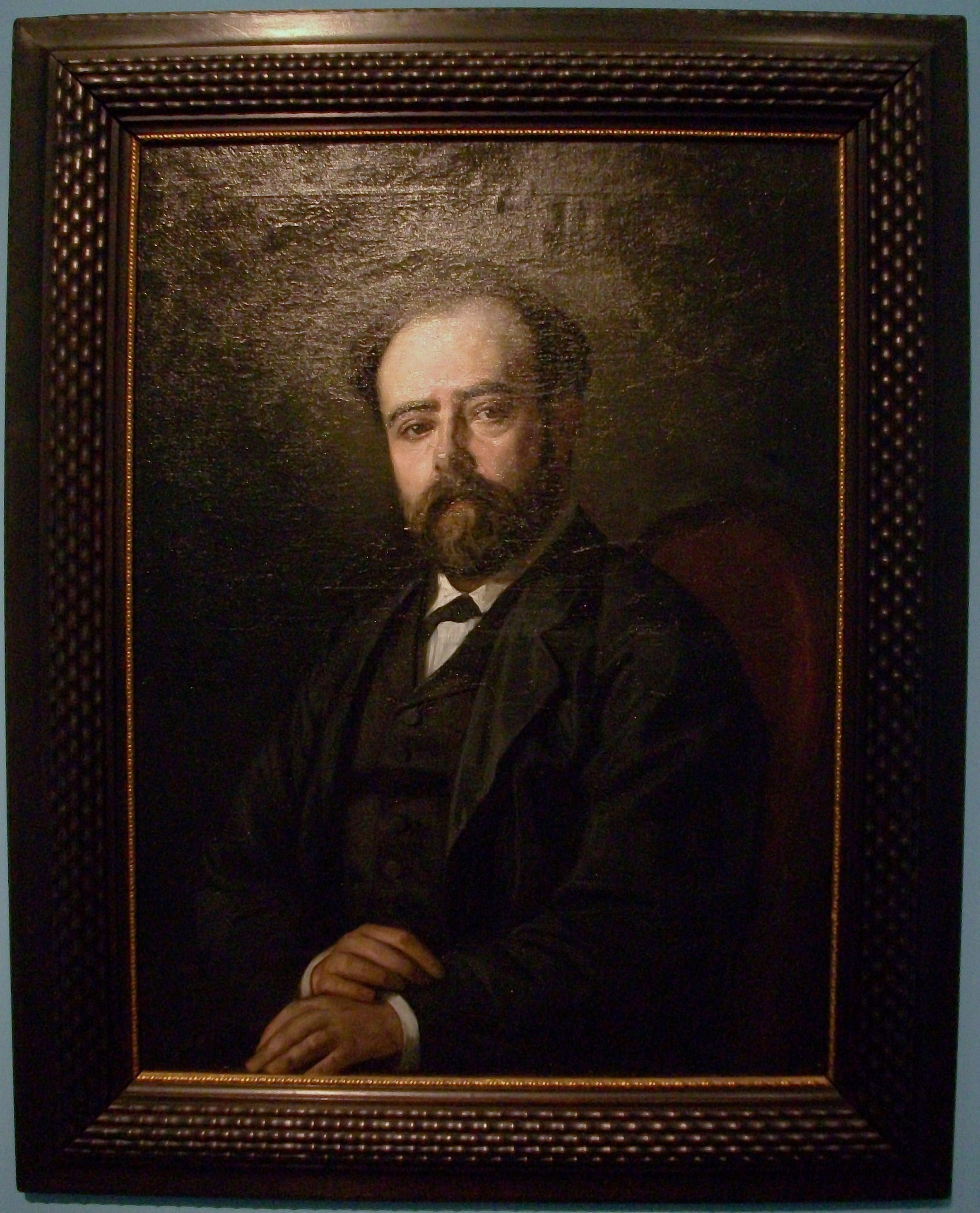 Retrat de Teodor Llorente i Olivares, Josep Gastaldi i Bo, 1872. Oli sobre llenç.